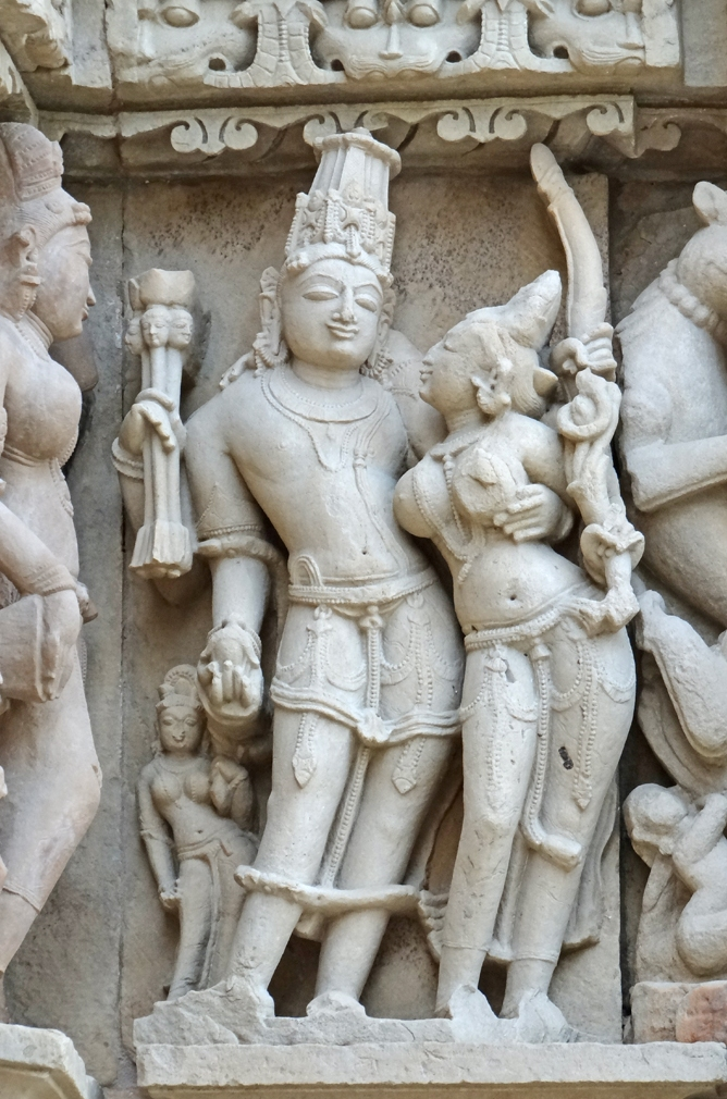 Le Dieu Kama, le dieu du désir amoureux et sa parèdre Ratî, décor mural du temple de Parshvanath à Khajuraho Les attributs de Kama sont l'arc (comme le Dieu Eros ou Cupidon) et les cinq flèches de fleurs (symbolisant les cinq sens) Article de Wikipedia sur le Dieu Kama Ce temple est le plus imposant des temples jaïns du groupe est de Khajuraho. Il est renommé pour la qualité de ses sculptures extérieures. Il date de la période 950-970. Le Jaïnisme a été fondé au VIème siècle avant J.-C. par Mahavira (599-527 av J-C), qui était un contemporain du Bouddha. Tous deux s'opposaient au système des castes, au pouvoir des brahmanes et aux rites hindouistes. La non-violence (Ahimsa) est l'un des fondements de la religion jaïne. Selon Wikipedia, Parshvanâtha (Parshvanath) - au VIIIe ou VIIe siècle av. J.-C. - est un ascète membre du clan des Licchavi, qui aurait fondé un ordre comprenant 8 communautés. Ce temple lui a été dédié au XIXème siècle, cet ascète a été l'inspirateur de la religion jaïne. Les maîtres sont représentés nus sur les panneaux sculptés. Articles de Wikipedia sur le Jaïnisme et les Tîrthankara (maîtres jaïns)